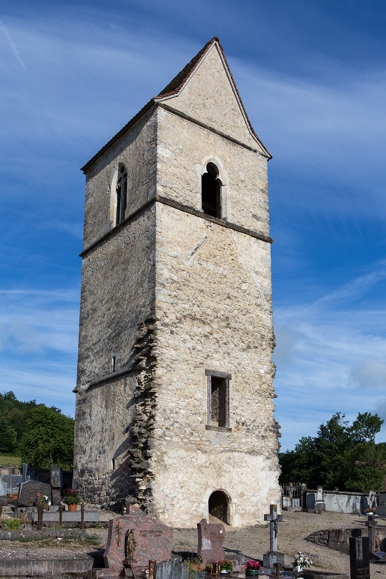 Alter Kirchturm, Tour de Mormont, in Courchavon (JU)